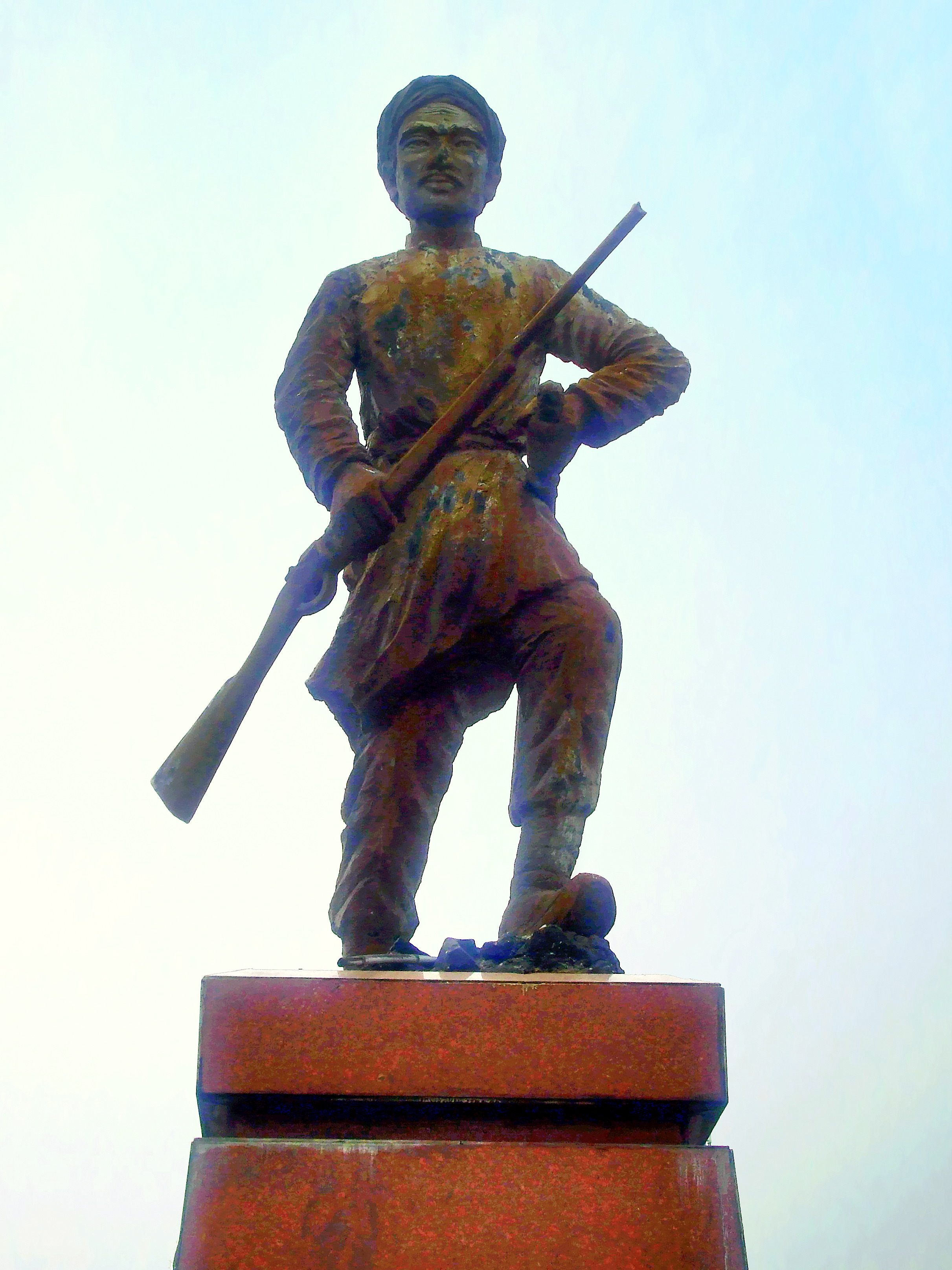 Tượng đài Phan Đình Phùng tại bùng binh trước Bưu điện Chợ Lớn thuộc quận 5, Thành phố Hồ Chí Minh, Việt Nam.